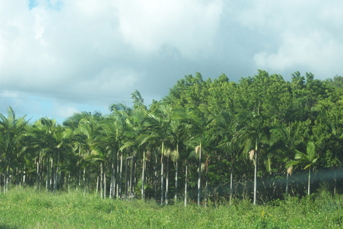 Auf der Fahrt zum Australian Zoo